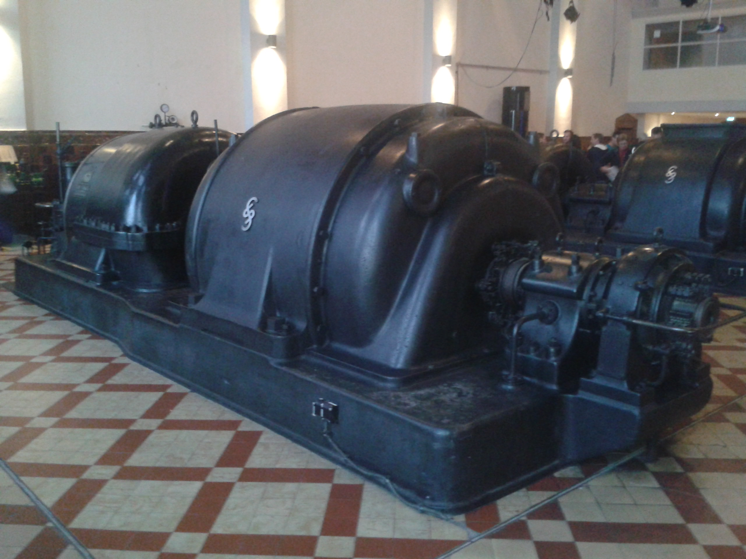 Elektrizitätswerk Worms: Dampfturbinen der Siemens-Schuckertwerke GmbH, dahinter auf der Achse die elektrischen Generatoren